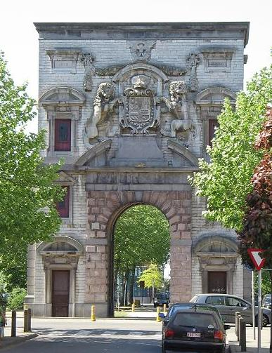 Description De Waterpoort in Antwerpen. Eigen werk De Waterpoort in Antwerpen.